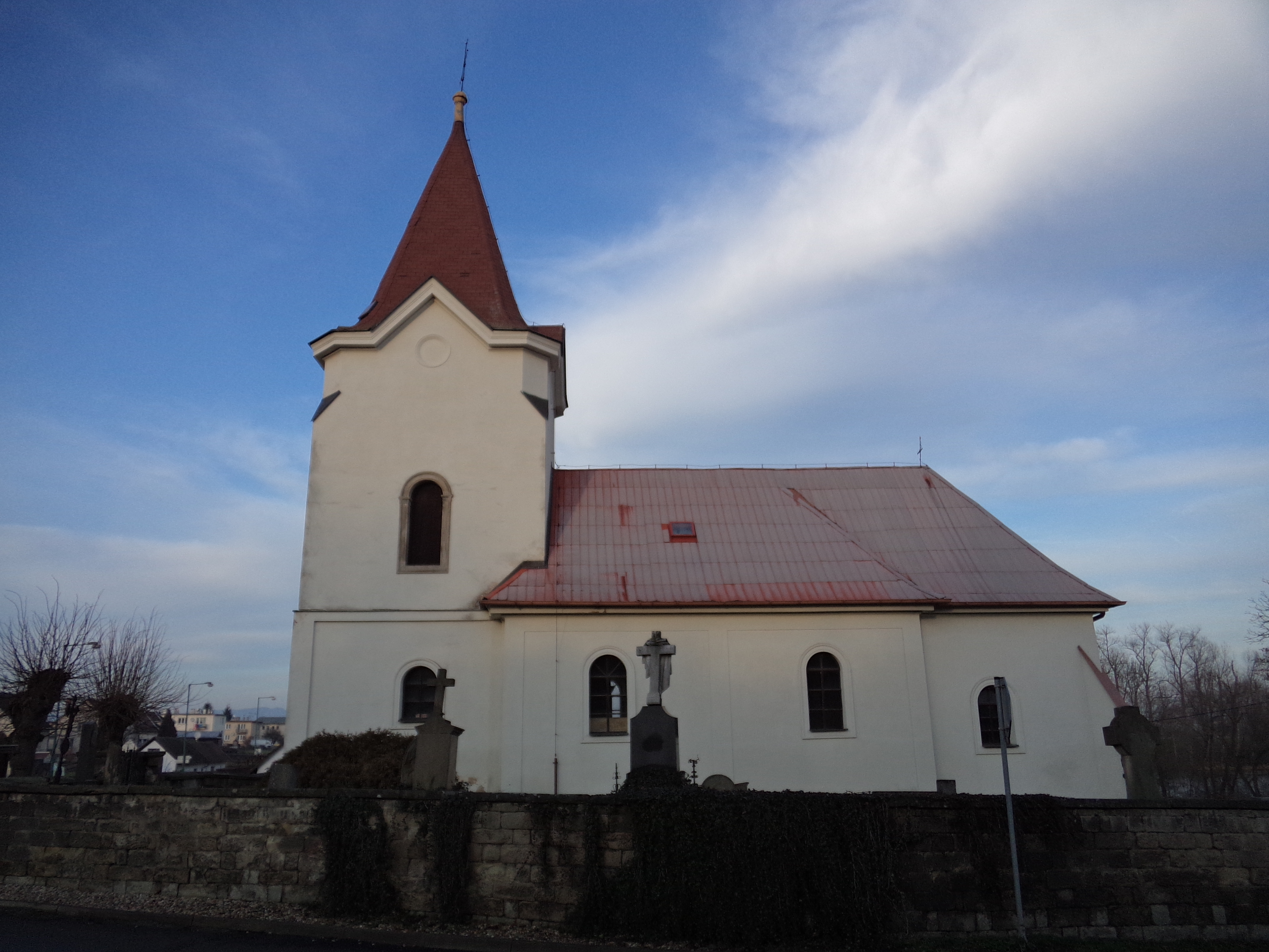 Kostel v obci Staré Místo, okres Jičín.